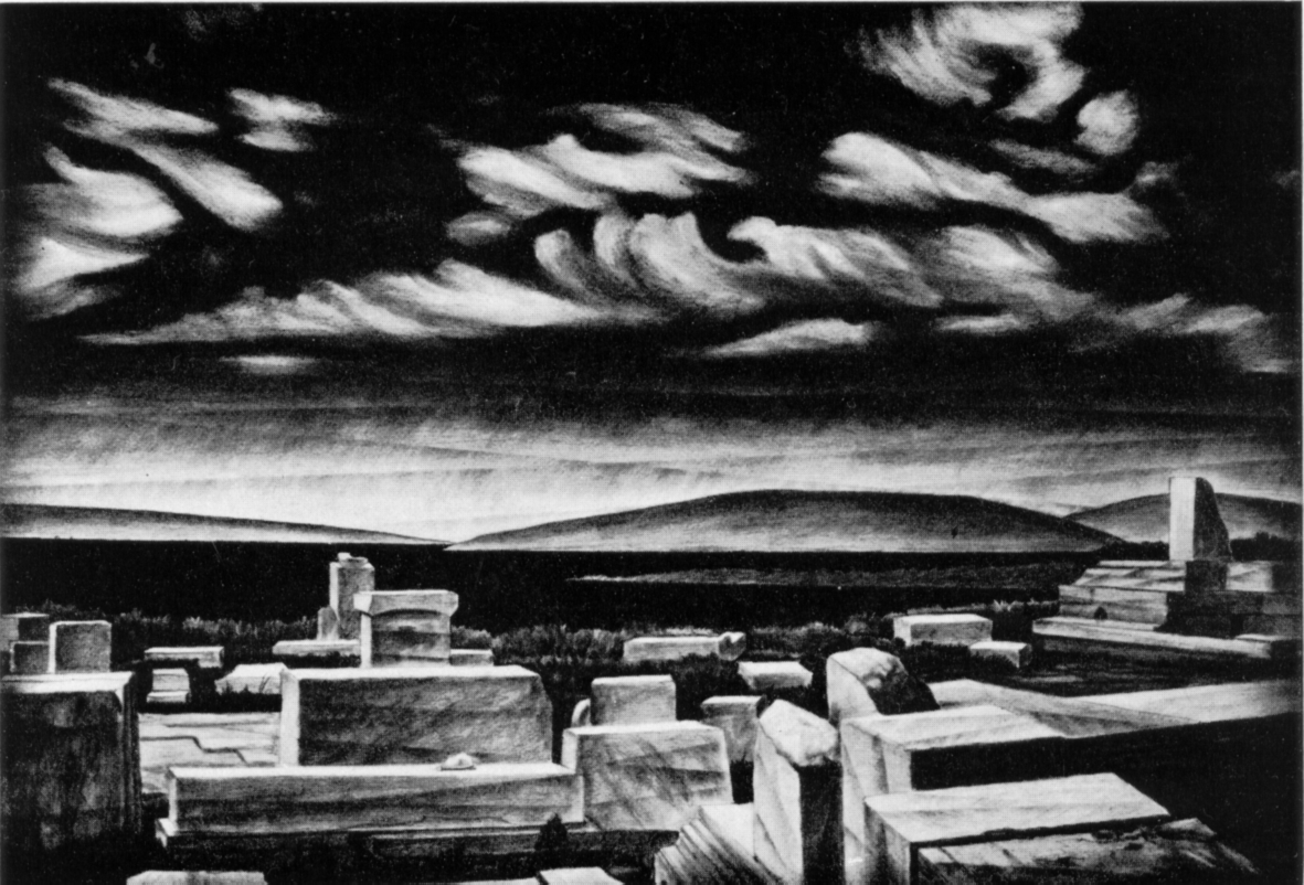 Рисунок Льва Шульца